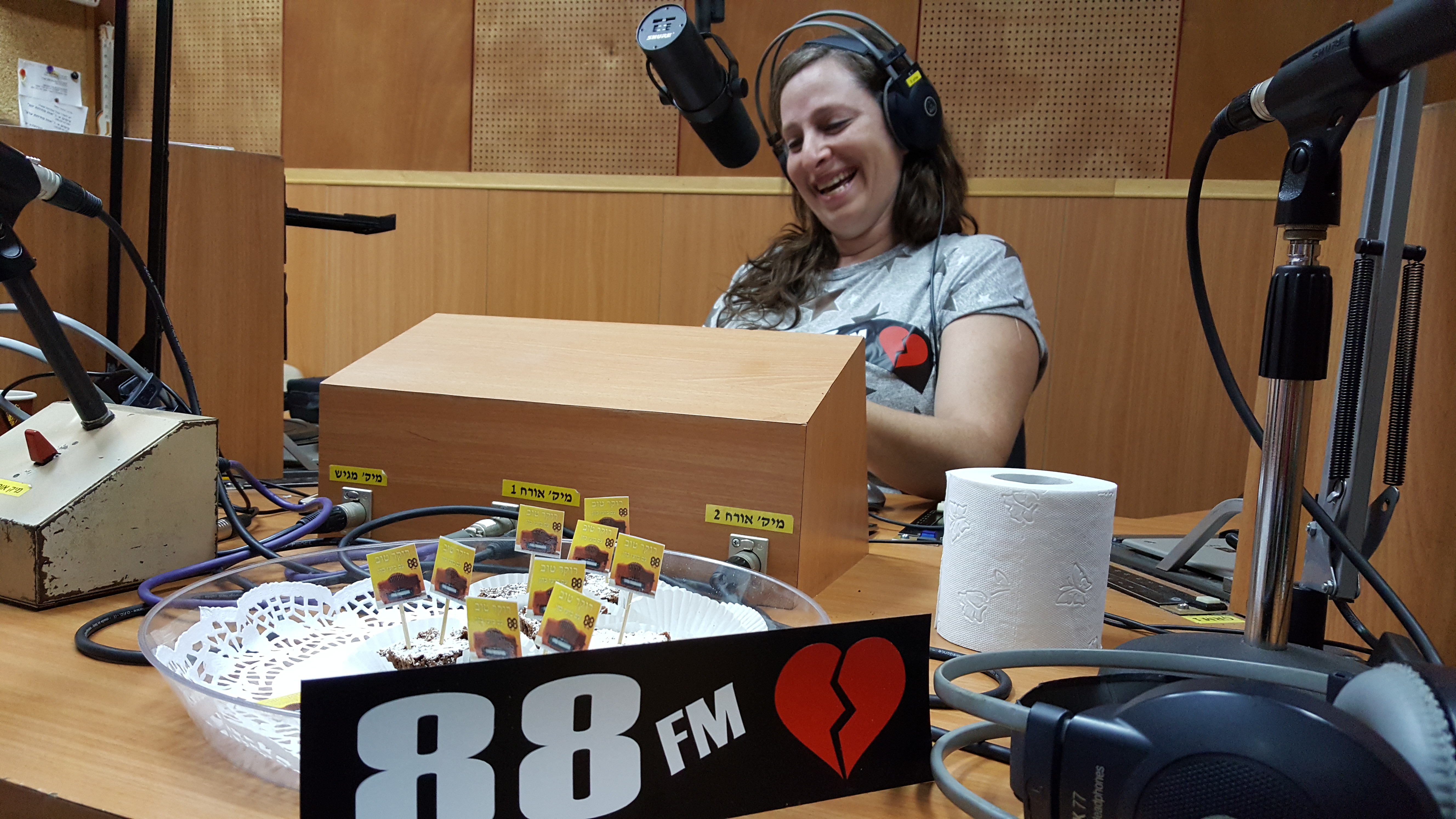 גלית גורא-עיני בשידור האחרון בהחלט ב-88